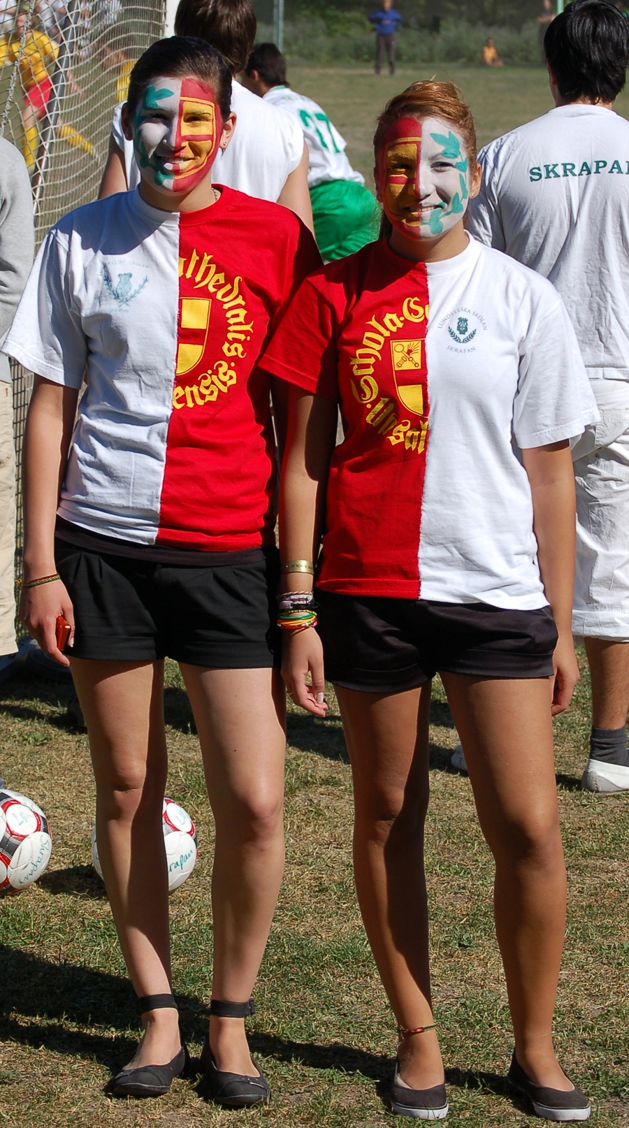 Bild från Katte-Skrapankampen 2008